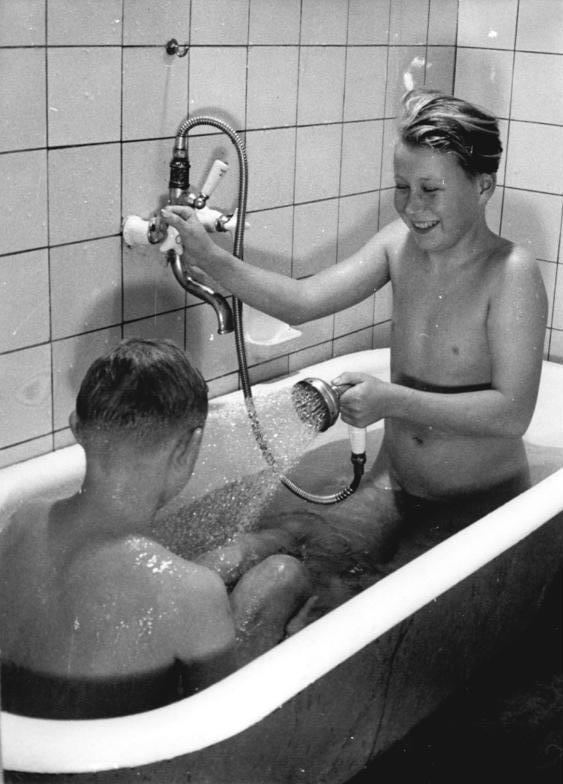 Plänitz, Badende in den Waschräumen der LPG Zentralbild Funck 24.11.1954 Die Bauern der LPG in Plänitz erarbeiten sich einen ständig wachsenden Wohlstand Die Genossenschaftsbauern der LPG Plänitz geben sich bei der Gründugn ihrer Genossenschaft den Namen "LPG der Dentsch-Sowjetischen Freundschaft". Gleichzeitig betrachteten sie das als Verpflichtung, sich die Erfahrungen der sowjetischen Kolchosbauern anzueignen und in ihrer Landwirtschaftlichen Produktionsgenossenschaft anzuwenden. Sie erzielten dabei grosse Erfolge und erarbeiteten sich einen ständig wachsenden Wohlstand. Durch naturgemässe Viehhaltung, Gruppenfütterung und andere sowjetische Neuerermethoden besitzen die Genossenschafter 163 Stück Rindvieh. ( Der Viehhalteplan sah für dieses Jahr nur 70 Rinder vor.) Bereits seit März 54 - die Genossenschaftler hattenschon damals das Milchsoll für 1954 erfüllt - lieferte die LPG 35.000 kg Milch für den freien Verkauf. UBz: Hans Walber und Friedrich Friase in den Baderäumen, die den Genossenschaftlern und ihren Angehörigen zu jeder Tageszeit zur Verfügung stehen.